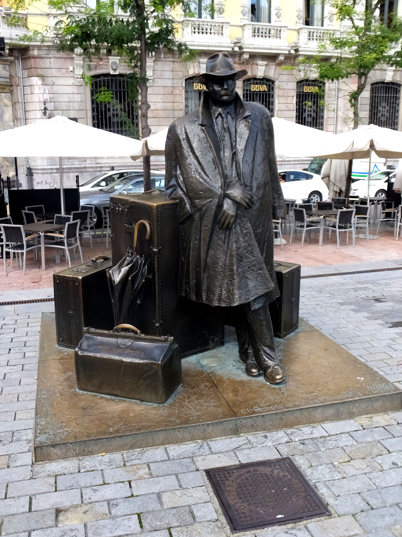 Asturias